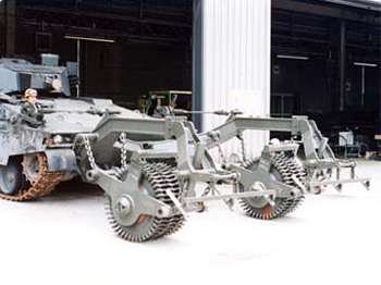 ○5枚組みローラ [全長]3,550mm [全幅]4,300mm [全高]1,700mm [重量]11.8t [開発]防衛庁技術研究本部 [製作]三菱重工業 昭和63年度から開発し、平成4年度に制式器材として制定された。戦車に装着し、主として小規模地雷原などの処理に使用する。